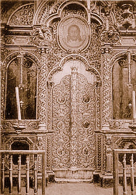 Іконостас Таращанської церкви, побудованої в 1753-му році